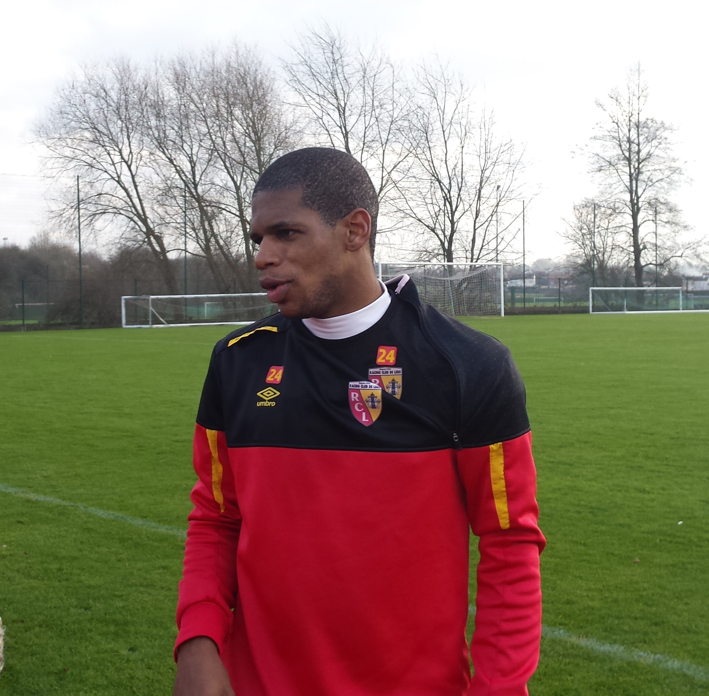 Ludovic Baal après un entraînement public du Racing Club de Lens, le 31 décembre 2014, sur le terrain "San Siro" du Centre Technique et Sportif de La Gaillette.